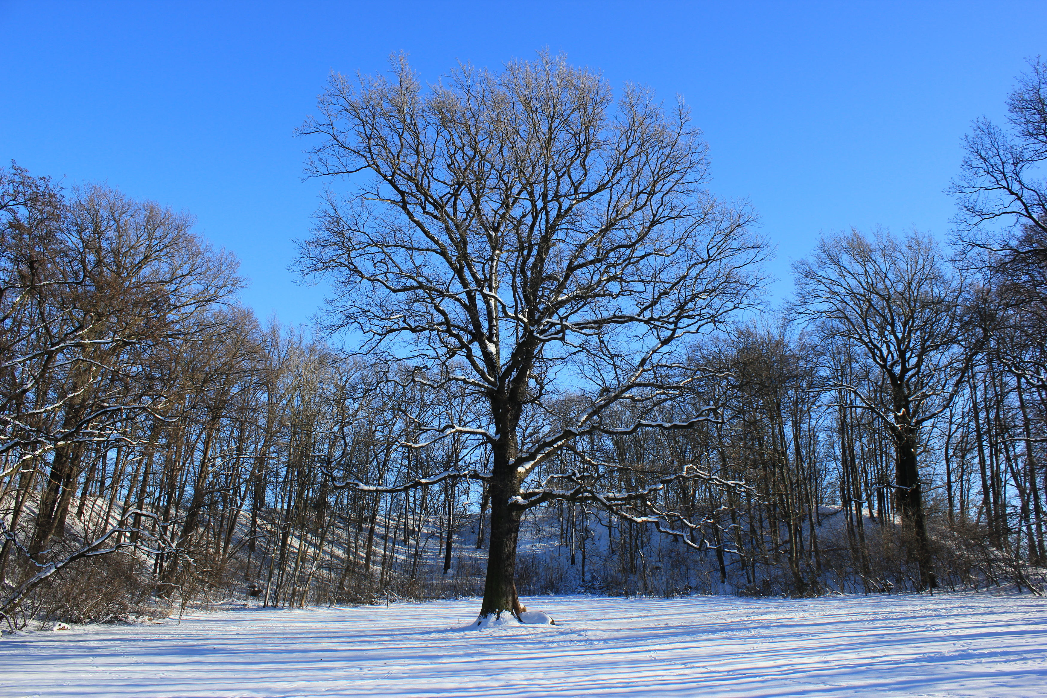 Hornjoserbsce: Na Něćinskim hrodźišću.